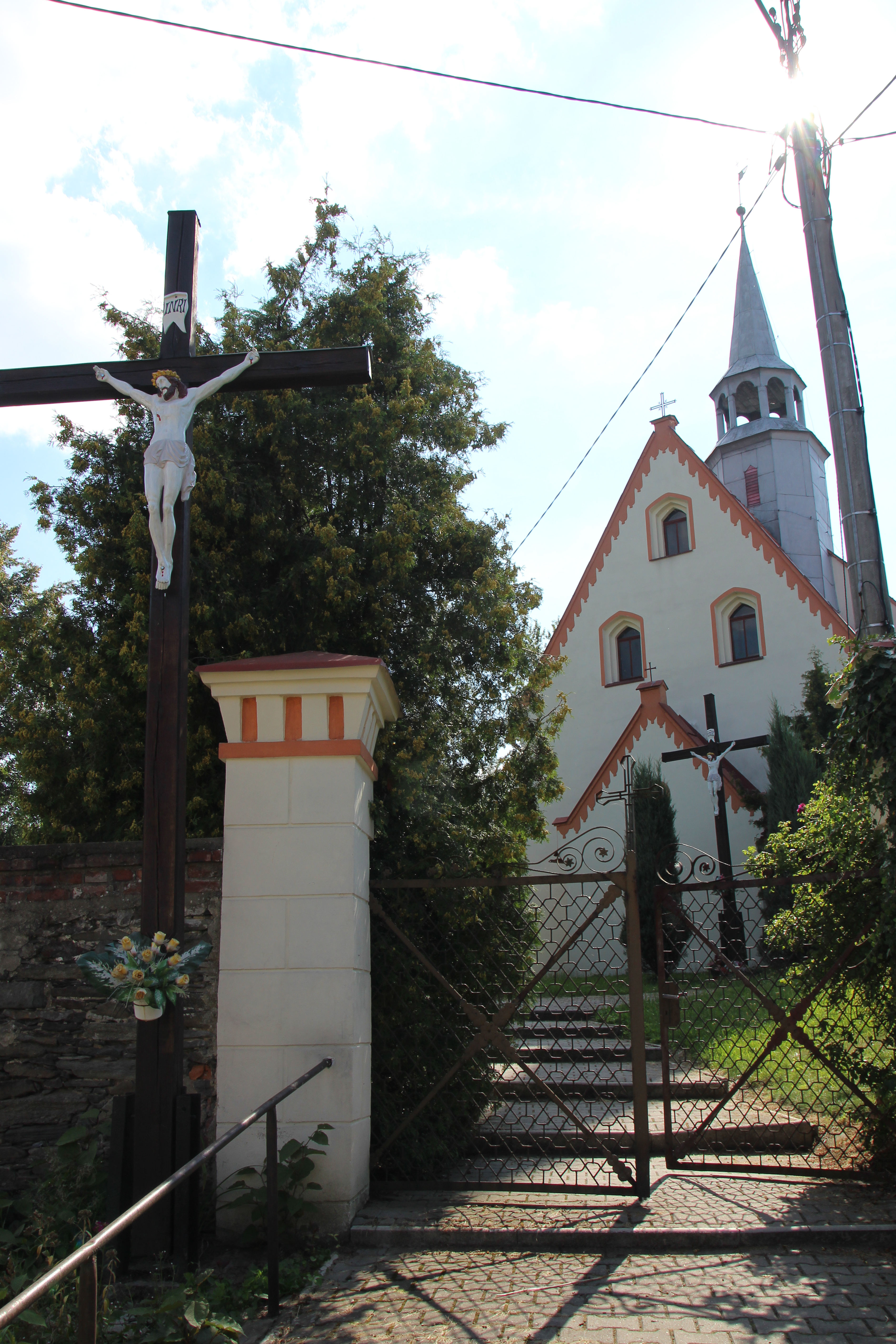 Mieszkowice – wieś w Polsce położona w województwie opolskim, w powiecie prudnickim, w gminie Prudnik.